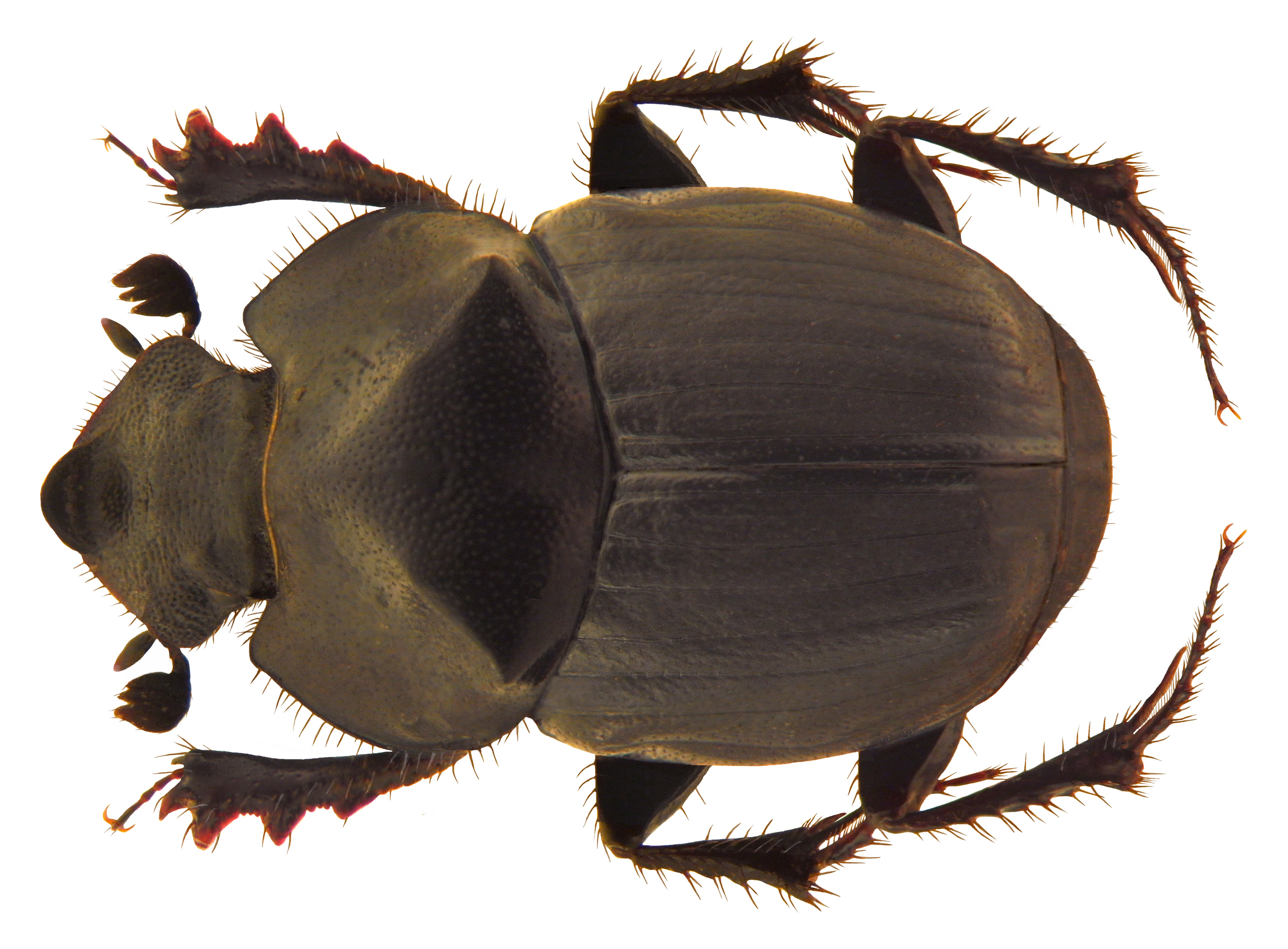 Familie: Scarabaeidae Groesse: 9,4 mm Fundort: Nepal, Mustang-District, Lethe, 2400 m leg. Martens & Schawaller, 1995; det. J.Scheuern, 1997 Photo: U.Schmidt, 2010